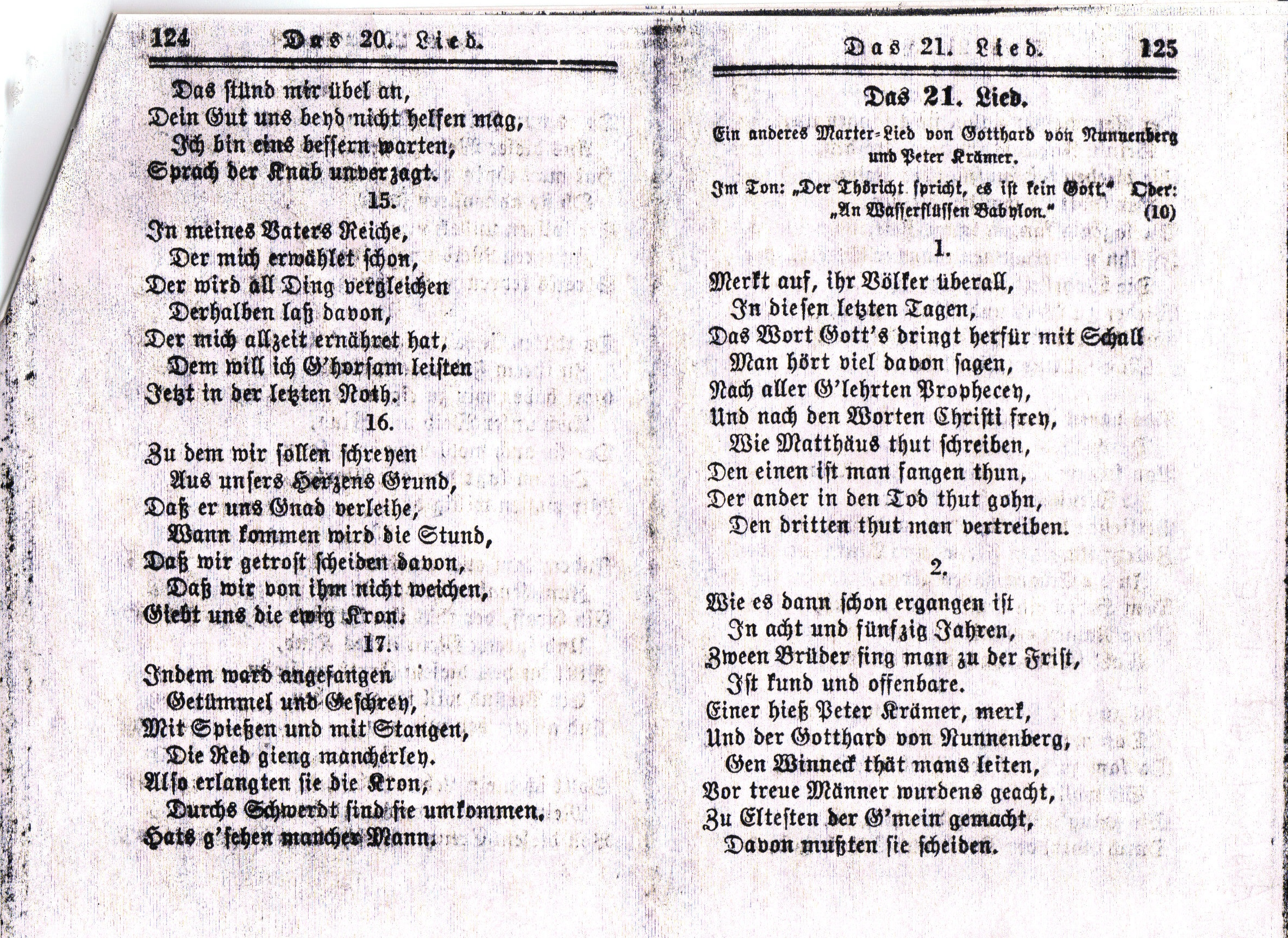 Ausbund das ist: Etliche schöne Christliche Lieder [...], 13. Auflage. Verlag von den Amischen Gemeinden in Lancaster County, Pa. 1977, pp. 120-124 no. 20